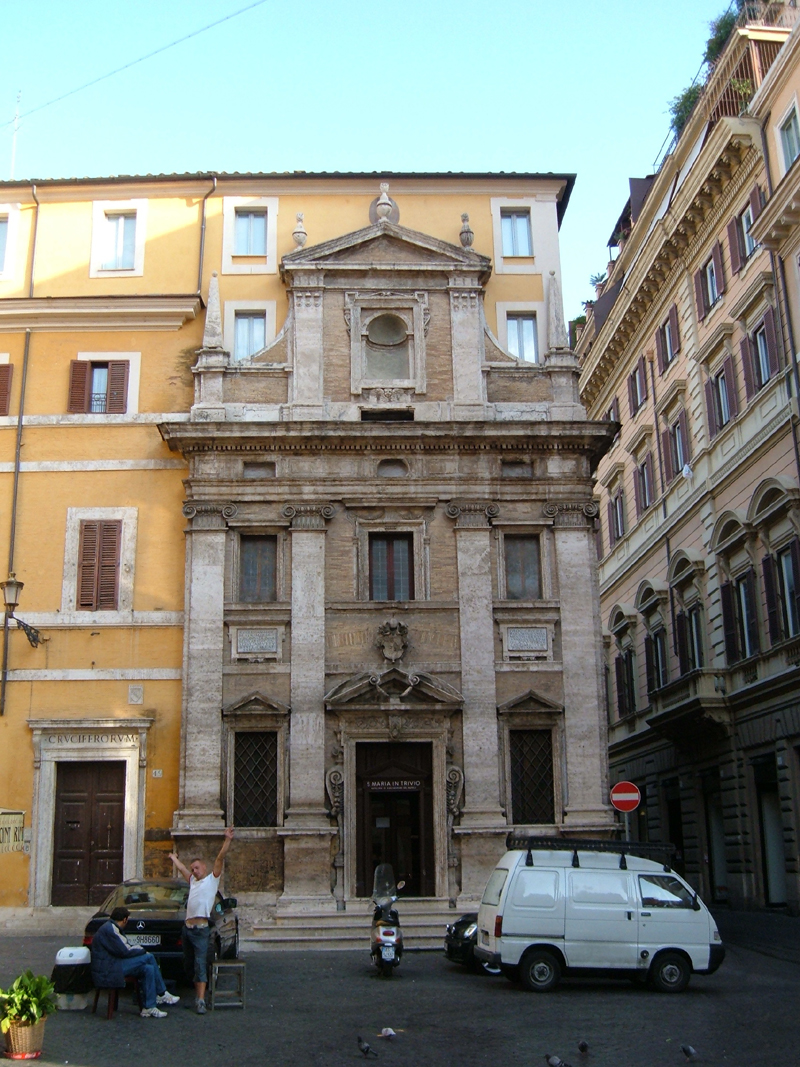 Chiesa di Santa Maria in Trivio, a Roma, nel rione Trevi.